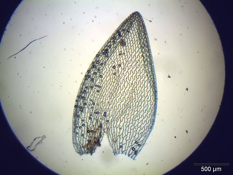 Mittleres Torfmoos (Sphagnum magellanicum), Astblatt, Vergrößerung: 40x